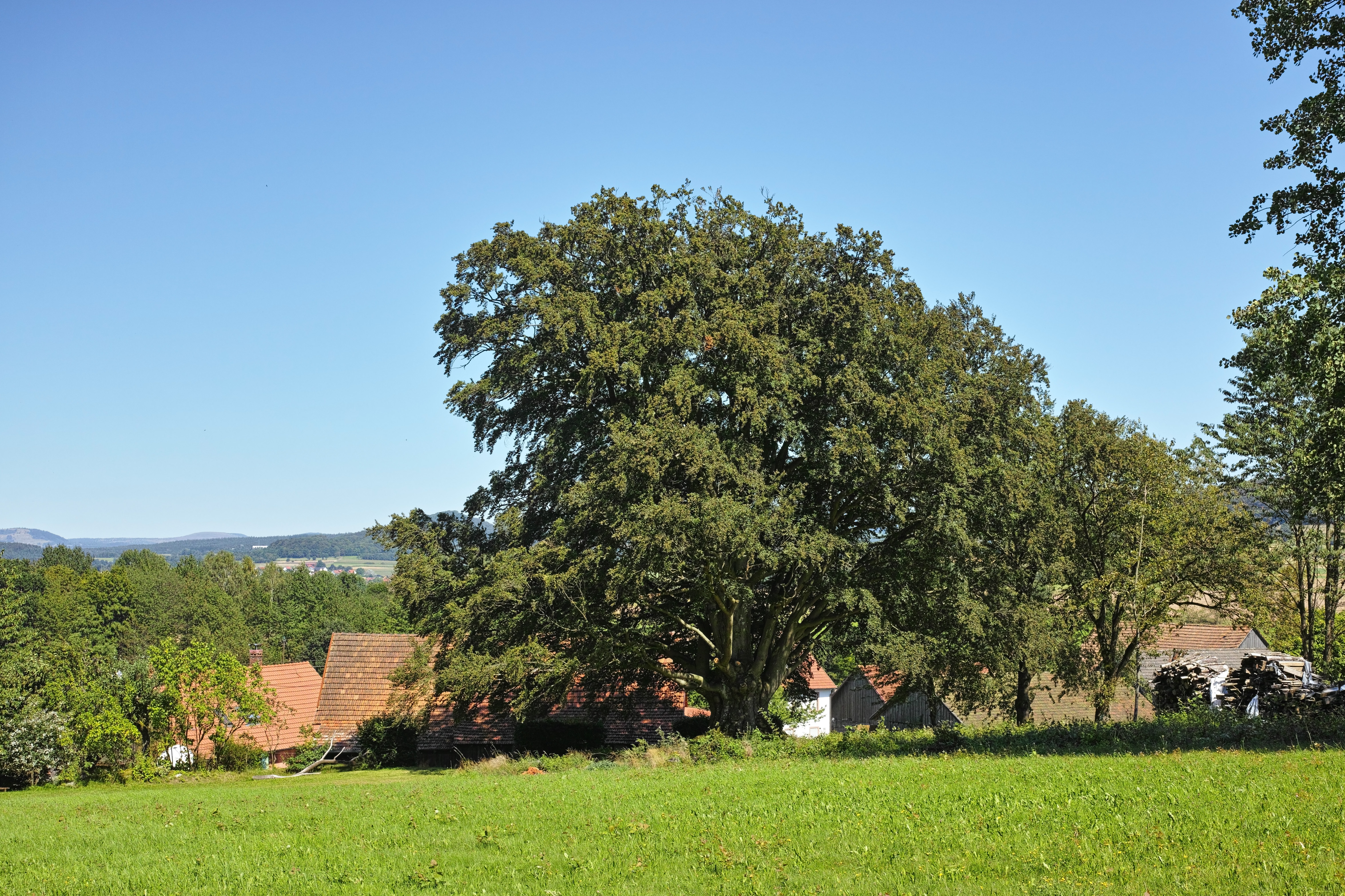 Hannesebuche bei Schönderling in der bayerischen Rhön. Die auf 420 Meter über Normalnull stehende Rotbuche (Fagus sylvatica) hat einen Stammumfang von 6,31 Meter und 21 Meter Höhe. Die etwa 200 bis 250 Jahre alte Buche ist seit dem 28. Dezember 1959 bei der Unteren Naturschutzbehörde des Landkreises Bad Kissingen mit der Nummer 672-N/024 als Naturdenkmal gelistet.